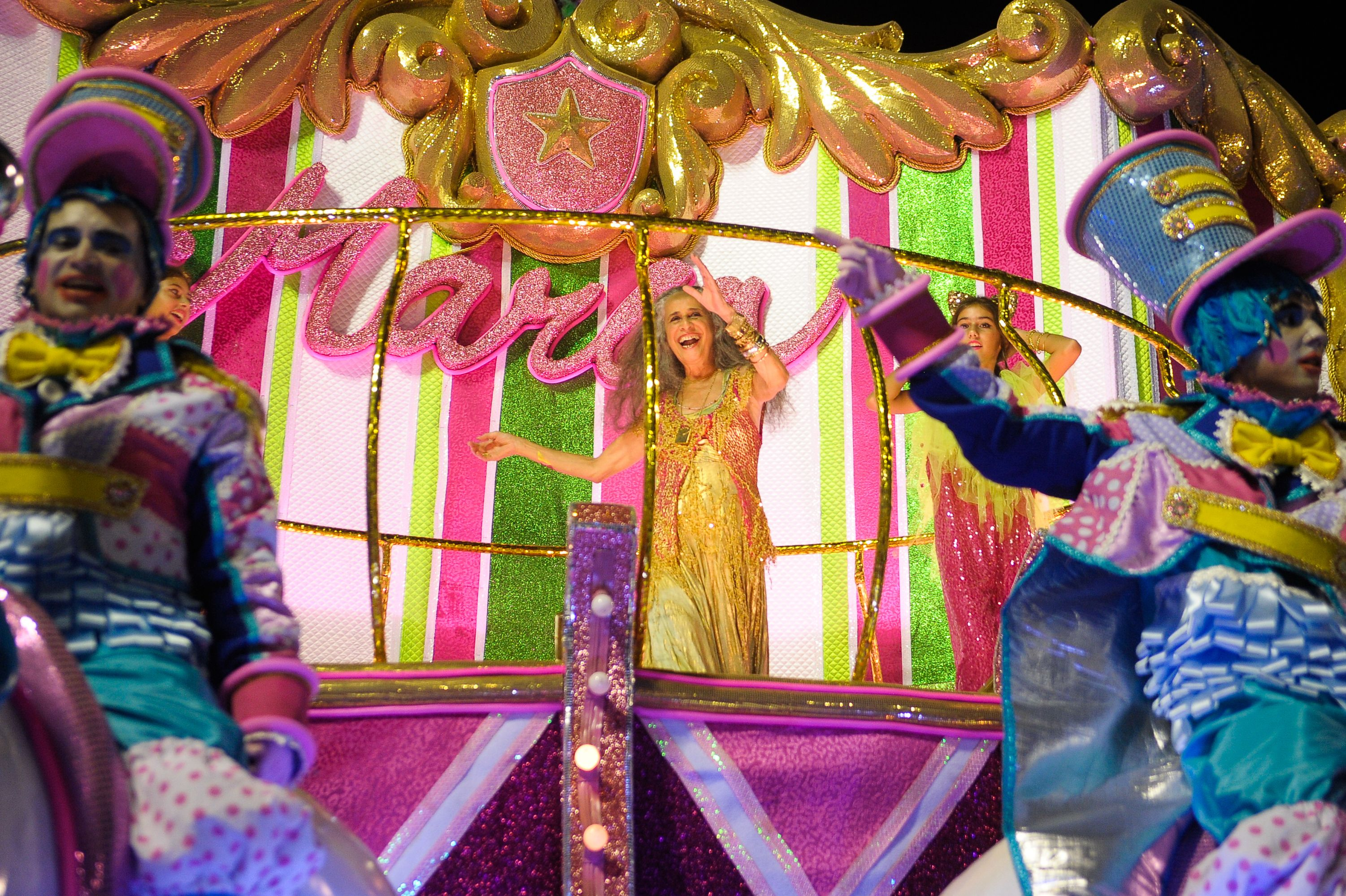 Rio de Janeiro - Maria Bethânia desfila pela Mangueira no carnaval de 2016 (Tomaz Silva/Agência Brasil)